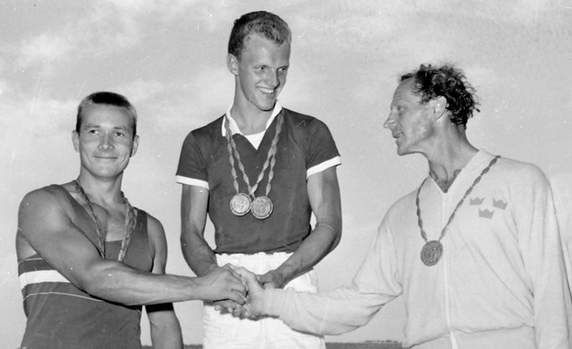 Imre Szöllősi, Erik Hansen, Gert Fredriksson at the 1960 Olympics